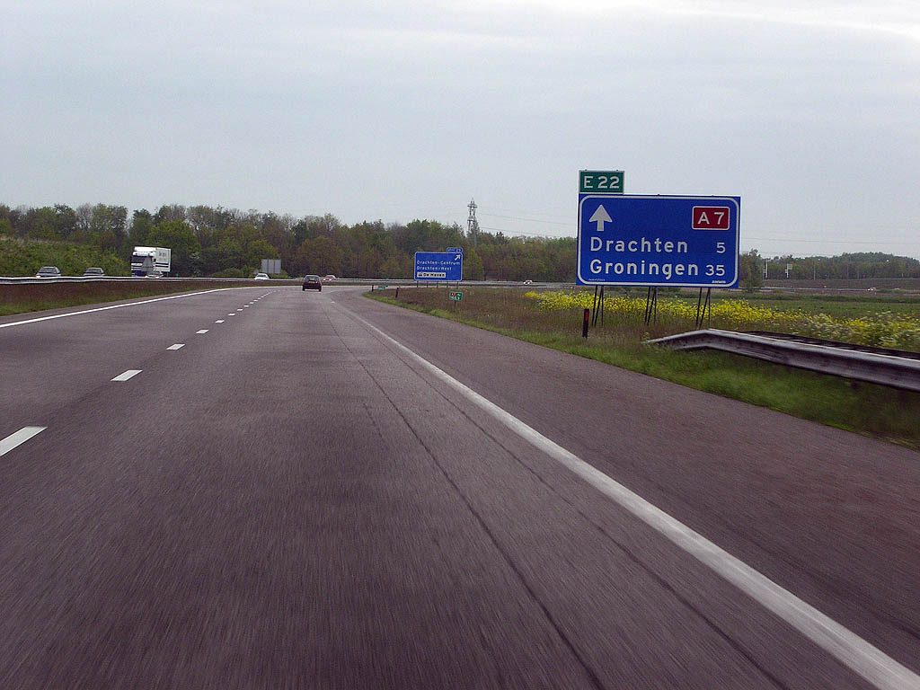 A7 Richting Groningen, nabij afrit Drachten-Centrum (29)